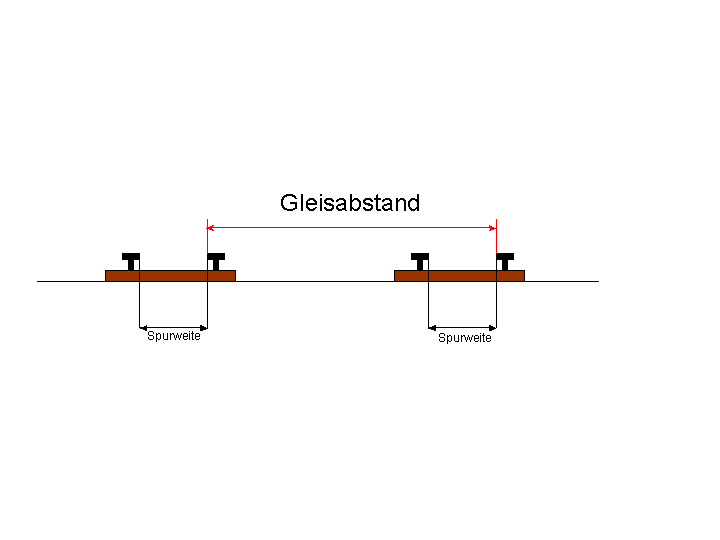 Näherungsverfahren zur Bestimmung des Gleisabstands bei parallelen, geraden Gleisen mit gleicher Spurweite